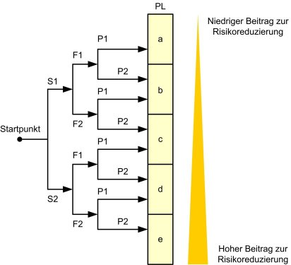 Risikograf